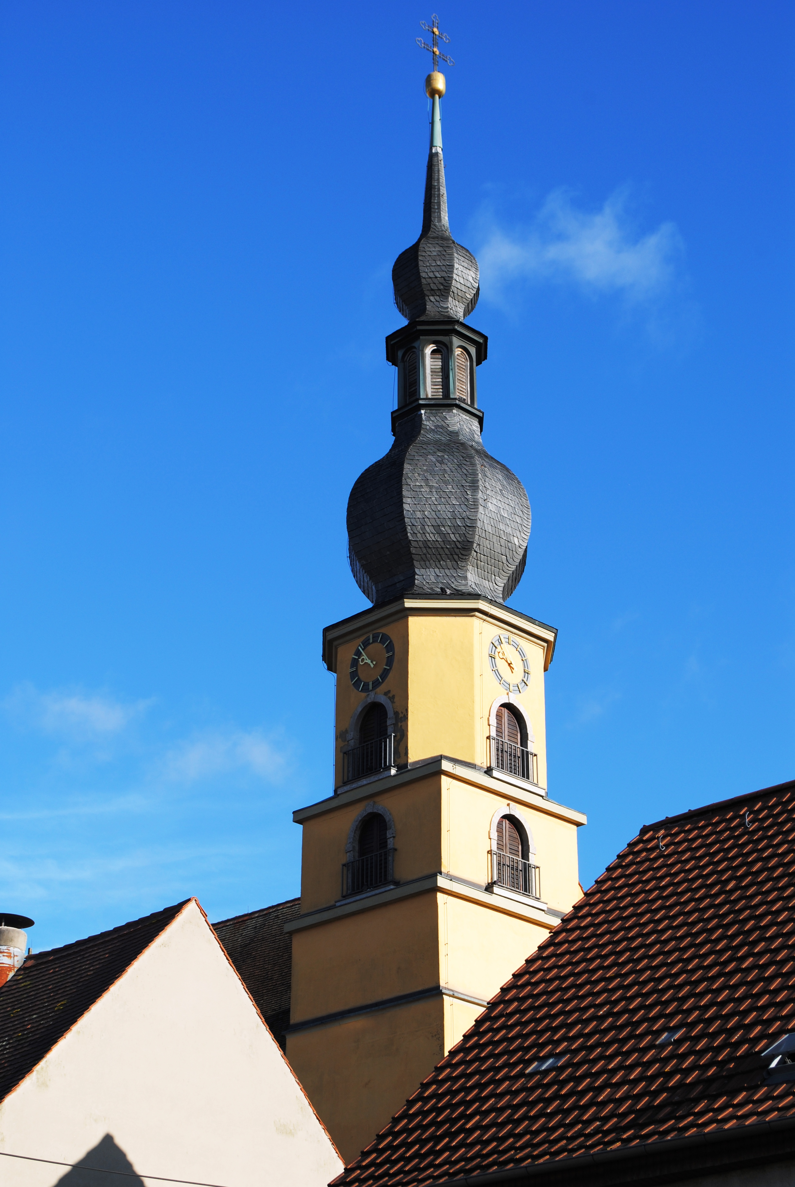 Kirchturm, St. Martin Willanzheim